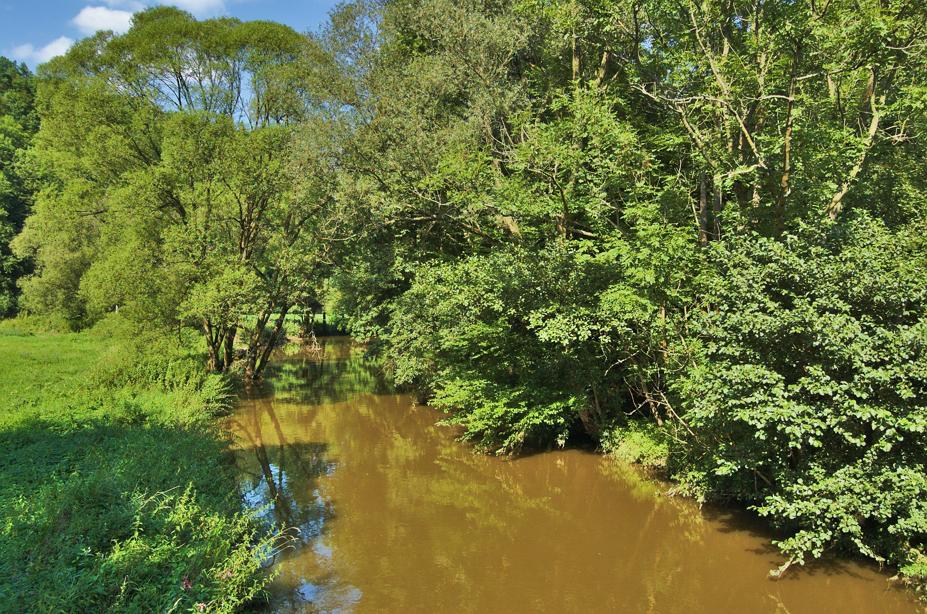 Třebůvka mezi obcemi Kadeřín a Doly, Bouzov, okres Olomouc